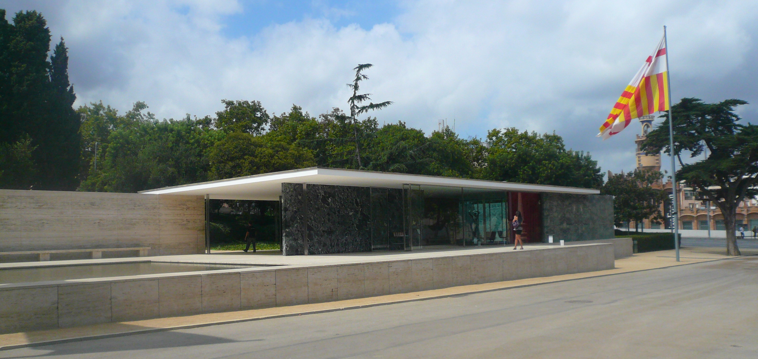 Pavelló alemany (Barcelona)